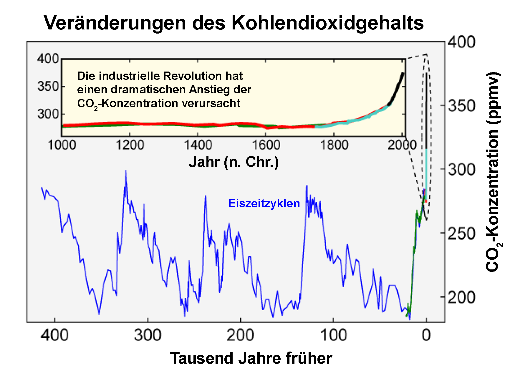 Das Bild zeigt den Verlauf der CO2-Konzentration in der Atmosphäre während der letzten 400.000 Jahre. Näheres bitte Originalbild entnehmen. Erläuterung (blue) Vostok ice core: Fischer, H., M. Wahlen, J. Smith, D. Mastroianni, and B. Deck (1999). "Ice core records of Atmospheric CO2 around the last three glacial terminations". Science 283: 1712-1714. (green) EPICA ice core: Monnin, E., E.J. Steig, U. Siegenthaler, K. Kawamura, J. Schwander, B. Stauffer, T.F. Stocker, D.L. Morse, J.-M. Barnola, B. Bellier, D. Raynaud, and H. Fischer (2004). "Evidence for substantial accumulation rate variability in Antarctica during the Holocene, through synchronization of CO2 in the Taylor Dome, Dome C and DML ice cores". Earth and Planetary Science Letters 224: 45-54. (red) Law Dome ice core: D.M. Etheridge, L.P. Steele, R.L. Langenfelds, R.J. Francey, J.-M. Barnola and V.I. Morgan (1998) "Historical CO2 records from the Law Dome DE08, DE08-2, and DSS ice cores" in Trends: A Compendium of Data on Global Change. Carbon Dioxide Information Analysis Center, Oak Ridge National Laboratory, U.S. Department of Energy, Oak Ridge, Tenn., U.S.A. (cyan) Siple Dome ice core: Neftel, A., H. Friedli, E. Moor, H. Lötscher, H. Oeschger, U. Siegenthaler, and B. Stauffer (1994) "Historical CO2 record from the Siple Station ice core" in Trends: A Compendium of Data on Global Change. Carbon Dioxide Information Analysis Center, Oak Ridge National Laboratory, U.S. Department of Energy, Oak Ridge, Tenn., U.S.A. (black) Mauna Loa Observatory, Hawaii: Keeling, C.D. and T.P. Whorf (2004) "Atmospheric CO2 records from sites in the SIO air sampling network" in Trends: A Compendium of Data on Global Change. Carbon Dioxide Information Analysis Center, Oak Ridge National Laboratory, U.S. Department of Energy, Oak Ridge, Tenn., U.S.A.